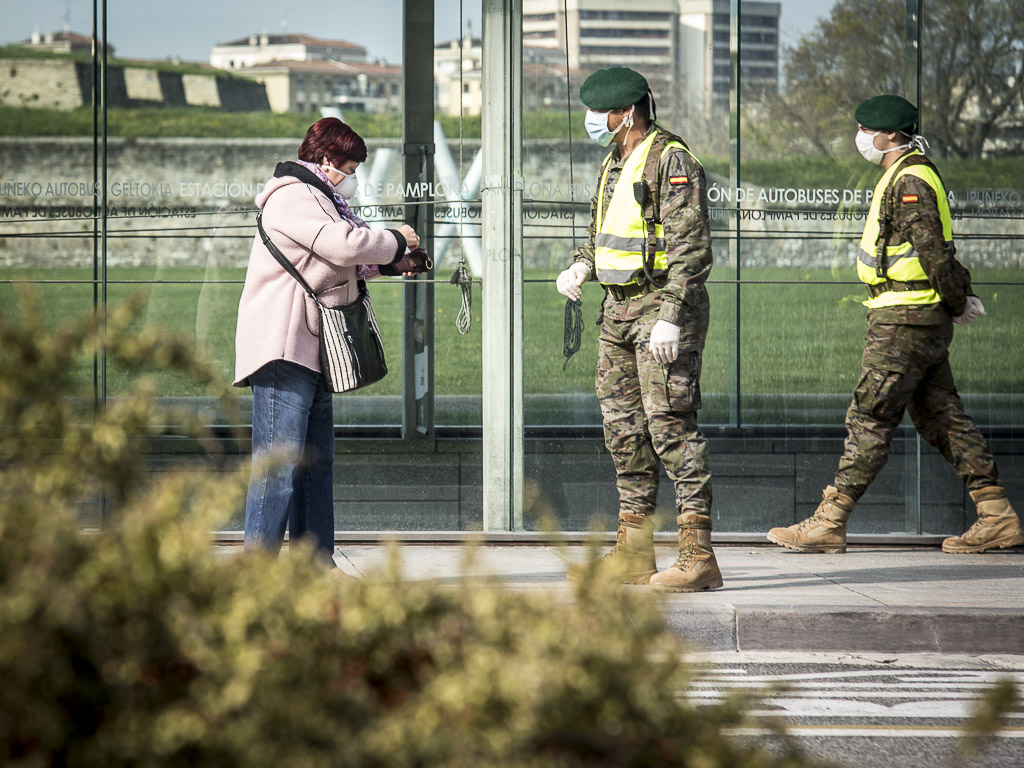 Espainiako Armada Iruñean, COVID-19aren pandemian. Irudi guztiak ikusteko